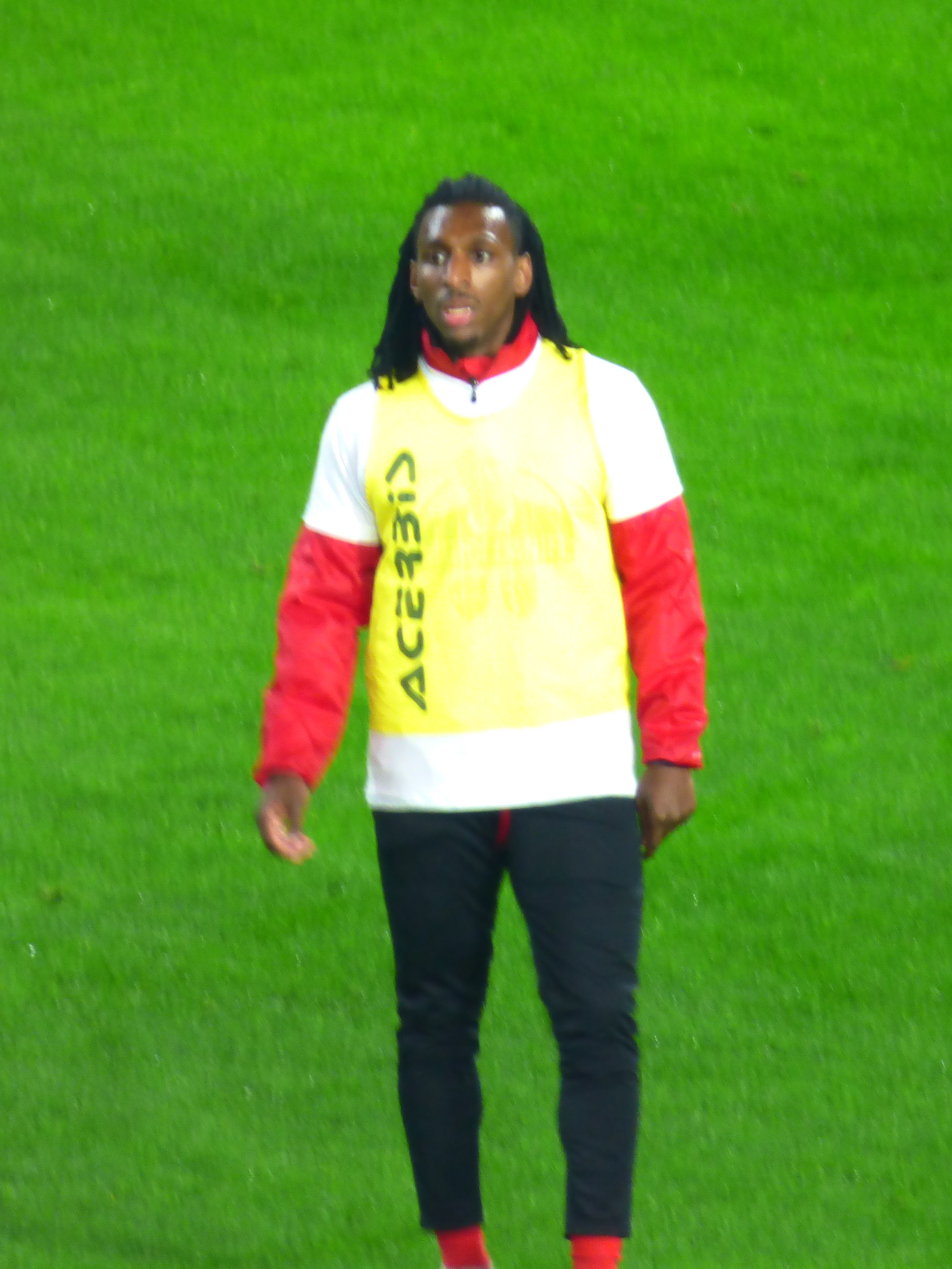 Sessi D'almeida avant le match Valenciennes FC / RC Lens, comptant pour la seizième journée du championnat de France de football de Ligue 2 2019-2020, le 29 novembre 2019.